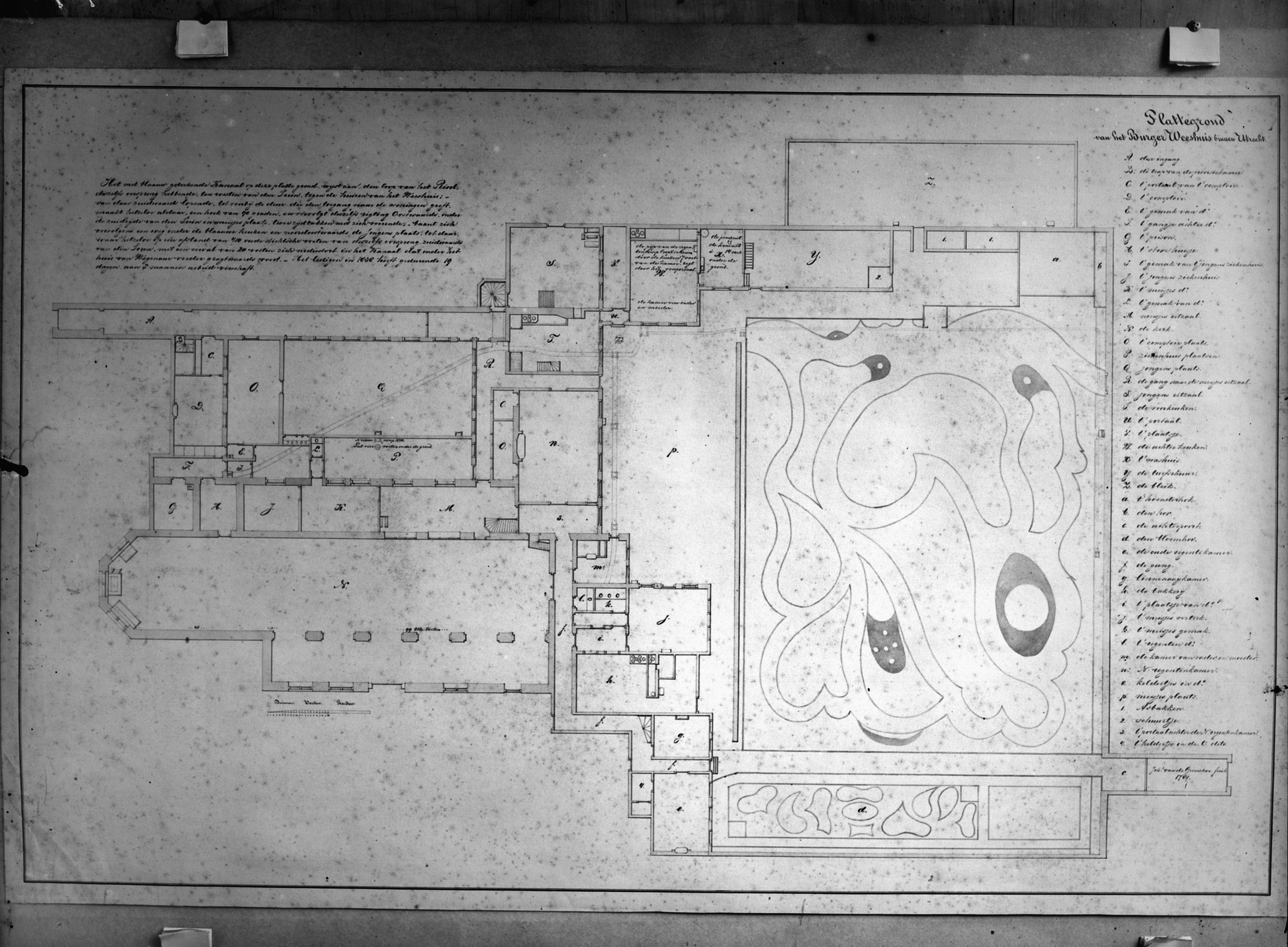 Voormalig Burgersweeshuis: Reguliersklooster, thans gereformeerd burgerweeshuis, plattegrond van 1781 in het Gemeente archief, topografische atlas nummer 919